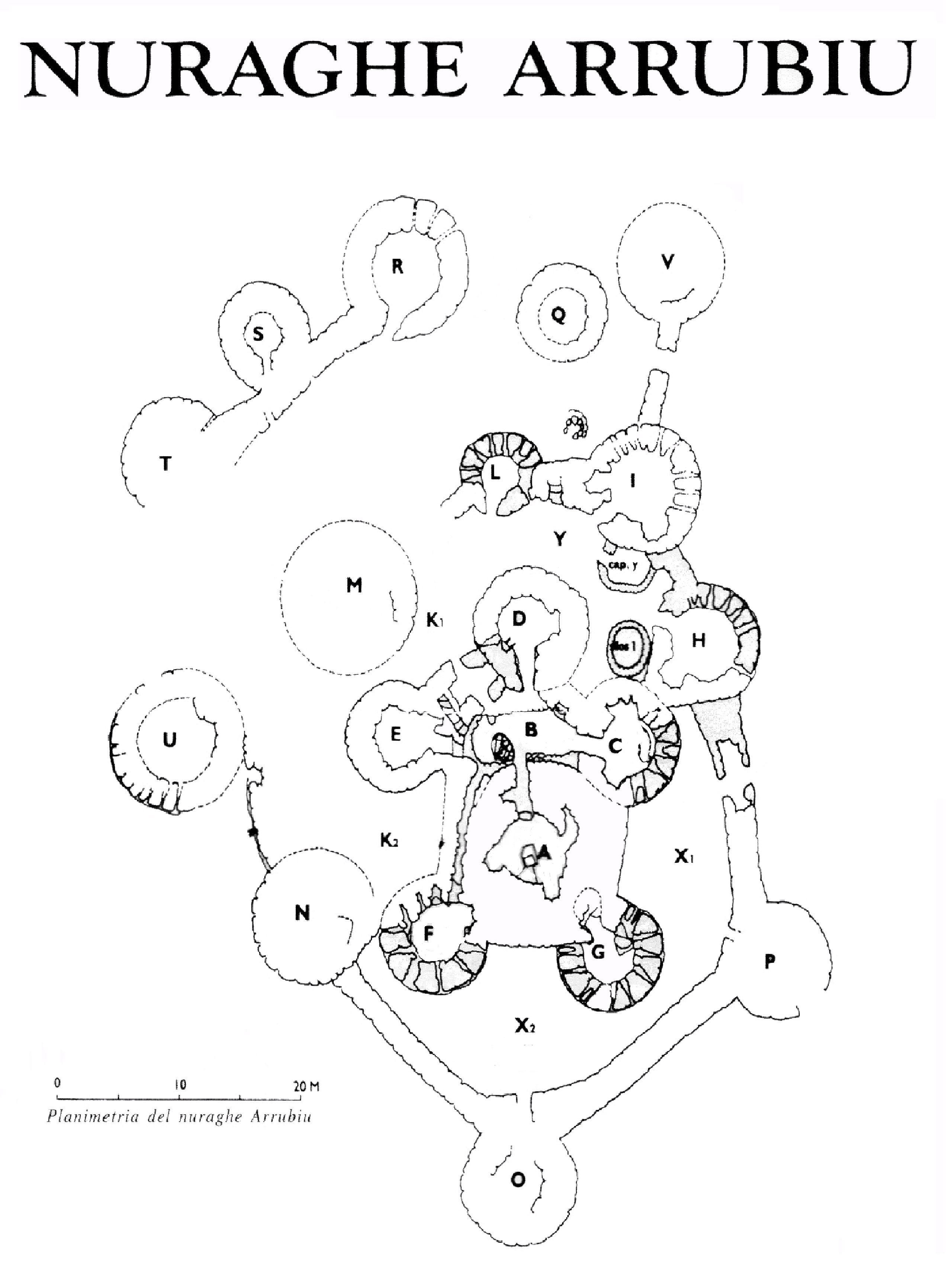 Pianta del Nuraghe Arrubiu di Orroli